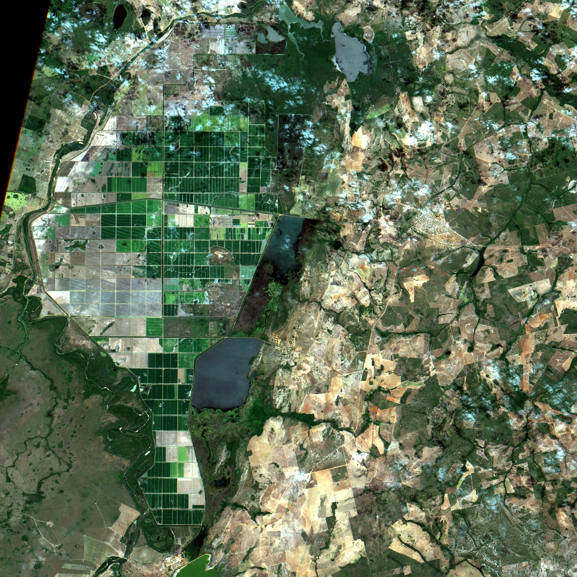 Plantação de arroz irrigado em Formoso do Araguaia, Tocantins. É o maior projeto de arroz irrigado em área contínua do mundo, totalizando 27.787 ha de várzea (segundo a Prefeitura no link abaixo). Em marrom, amarelo e branco, solo exposto. Área com arroz em crescimento em verde limão, arroz maduro em verde escuro. Lagos e áreas inundadas em cinza escuro e preto. Os lotes quadrados tem 1 x 1 km. Á esq. da imagem o Rio Formoso corre de S a N. No canto inferior esq. em marrom esverdeado, cerrado. No canto inferior dir., em amarelo, áreas de pastagem com vegetação seca devido à estiagem nessa época do ano / Irrigated rice plantation at Formoso do Araguaia, Brazil. It is the largest continuous irrigated rice project in the Wolrd, on 68,663 floodplain acres ( according to town website at link below). Exposed soil in brown, yellow and white. Growing rice appears in lemon green, mature in dark green. Lakes and flooded areas in dark grey and black. Square plots have 0.6 x 0.6 miles. Left of image, running from S to N is Formoso River. Savanna, in greenish brown at image left bottom corner. Cattle ranching at image right corner, appearing in yellow, with dry vegetation during drought, normal at this time of the year. + info irrigação #irrigation #arroz #rizicultura #arrozirrigado #rice #formosodoaraguaia #tocantins #floodplain #várzea #pecuaria #cattleranching #sensoriamentoremoto #remotesensing #cbers4 #cbers #inpe #geotecnologias Imagem / Image CBERS4 MUX Projeto de Arroz Irrigado em Formoso do Araguaia, TO Coordenadas do centro da imagem / Image center: 11°48'58.3"S 49°41'08.0"W Data / Date: 13-08-2019 / 2019-13-08 RGB765 (cor verdadeira / true color) Cena / Scene: 161 / 113 Autor / Author: Oton Barros (DSR/OBT/INPE) Imagem em HD / HD Image Visite-nos / Visit us